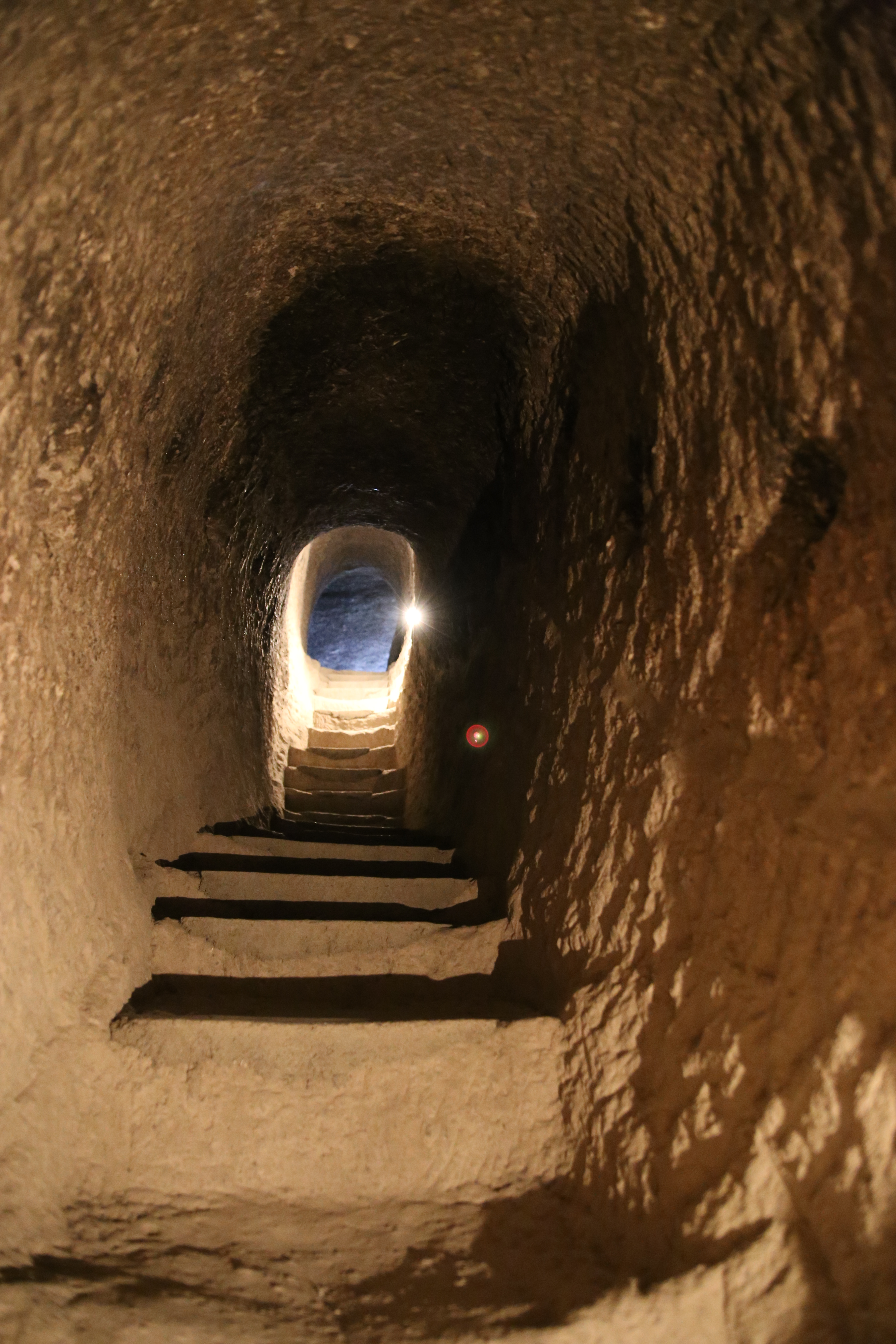 La città rupestre di Vardzia in Georgia, 2014.